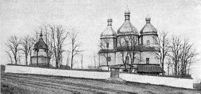 Свято-Успенська церква у селі Марківка Томашпільського району Вінницької області